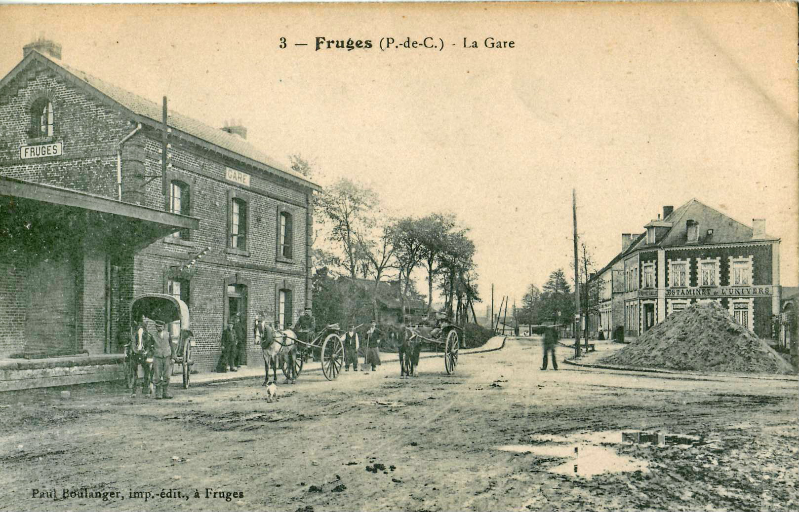 Carte postale ancienne éditée par Paul Boulanger à Fruges, n°3 : FRUGES - La Gare